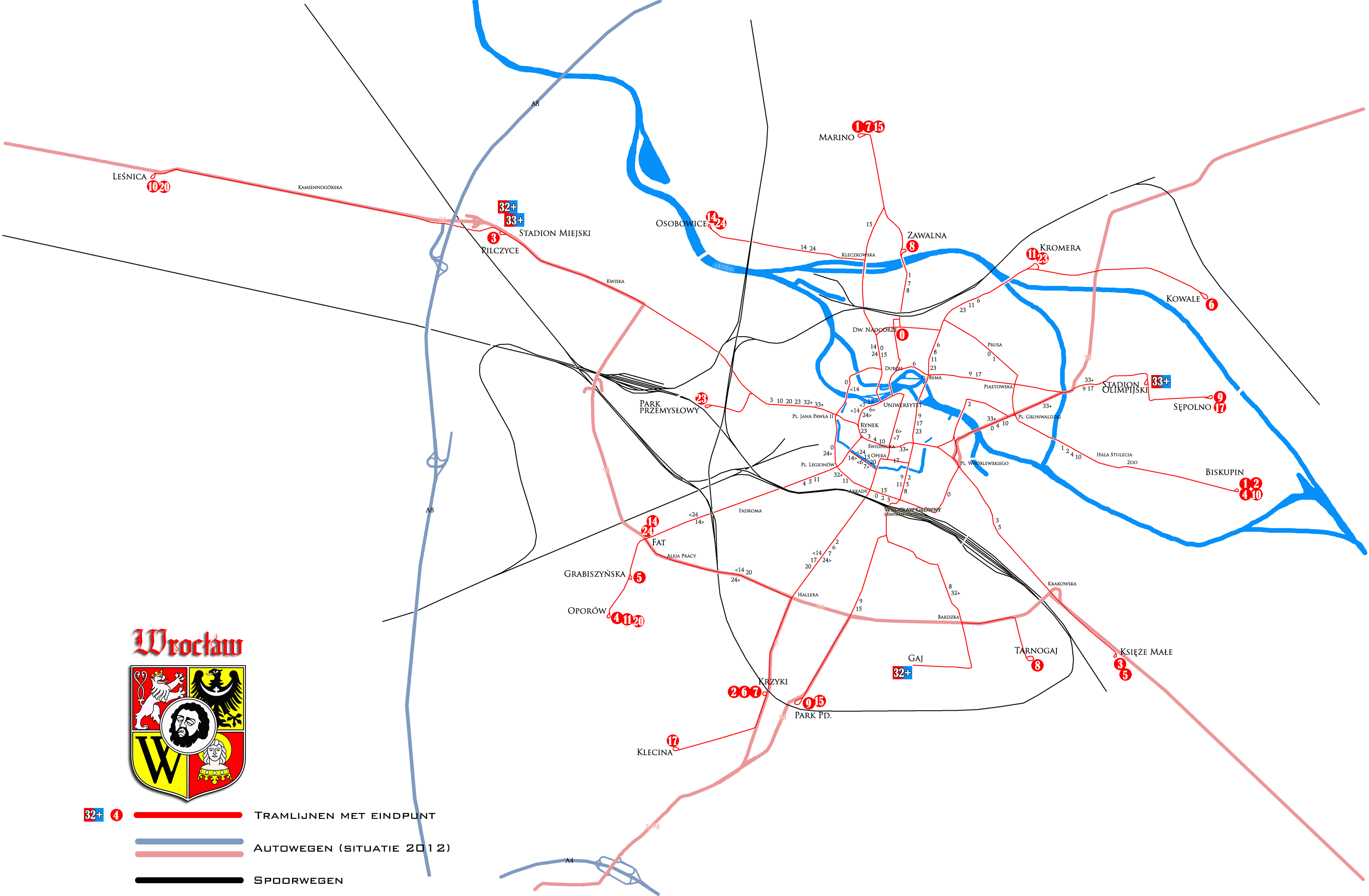 Tramnet Wroclaw in 2012